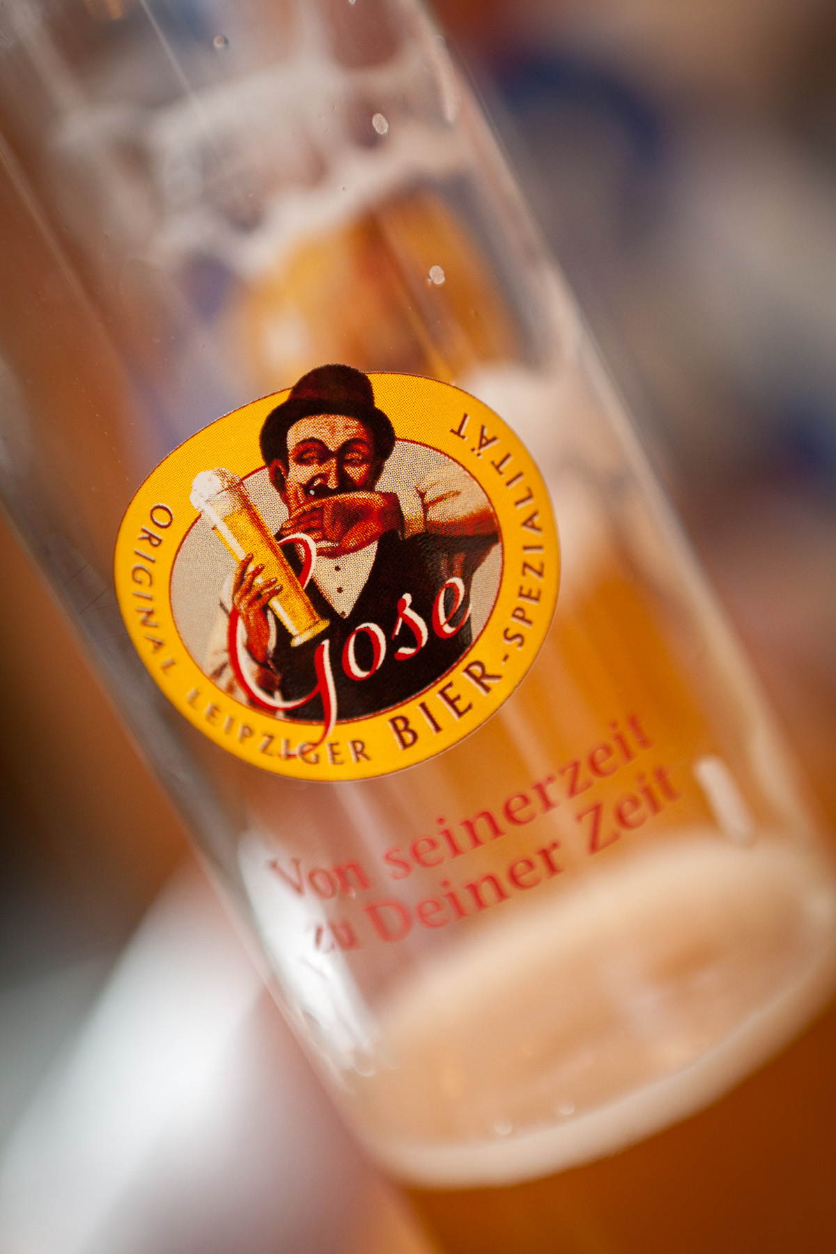 Gose beer glass